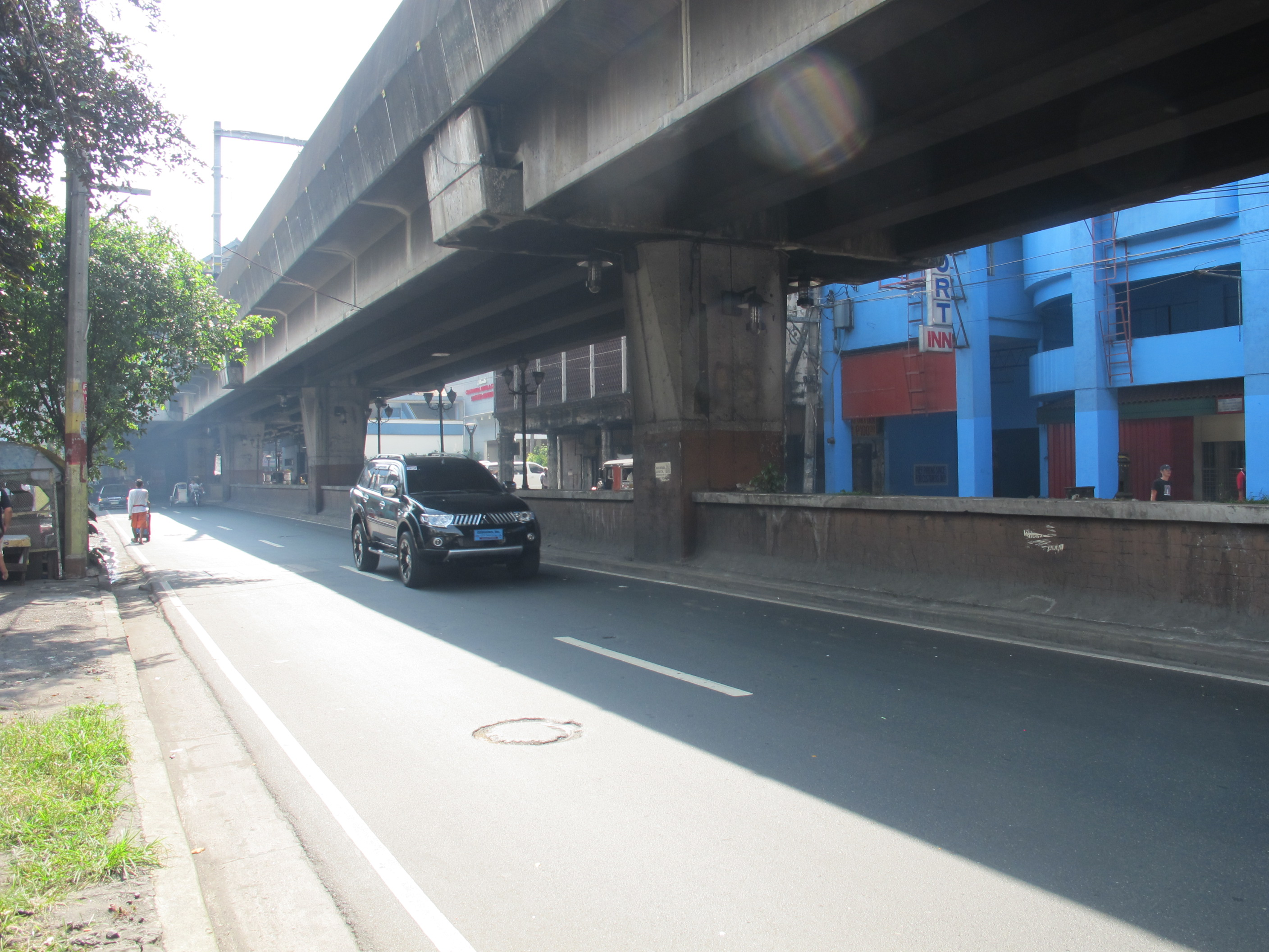 An angle of Rizal Avenue in Manila, Philippines